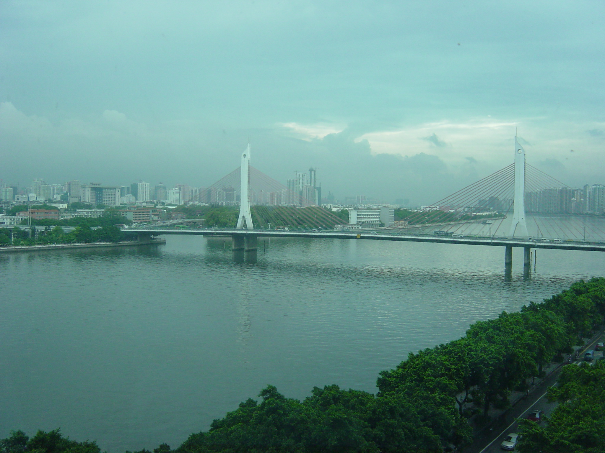 广州海印大桥